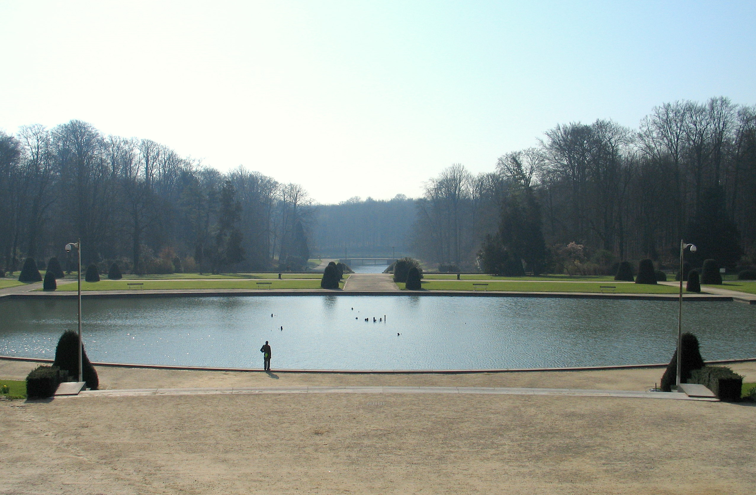 Garden at the Koninklijk Museum voor Midden-Afrika - own work by Paul Hermans